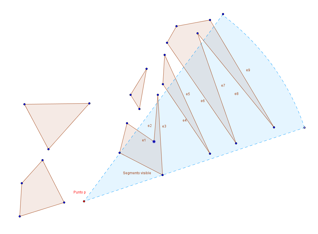 Cuando se procesa un segmento visible los segmentos que quedan ocultos pueden almacenarse en un árbol que representa los segmentos mostrados en la figura.